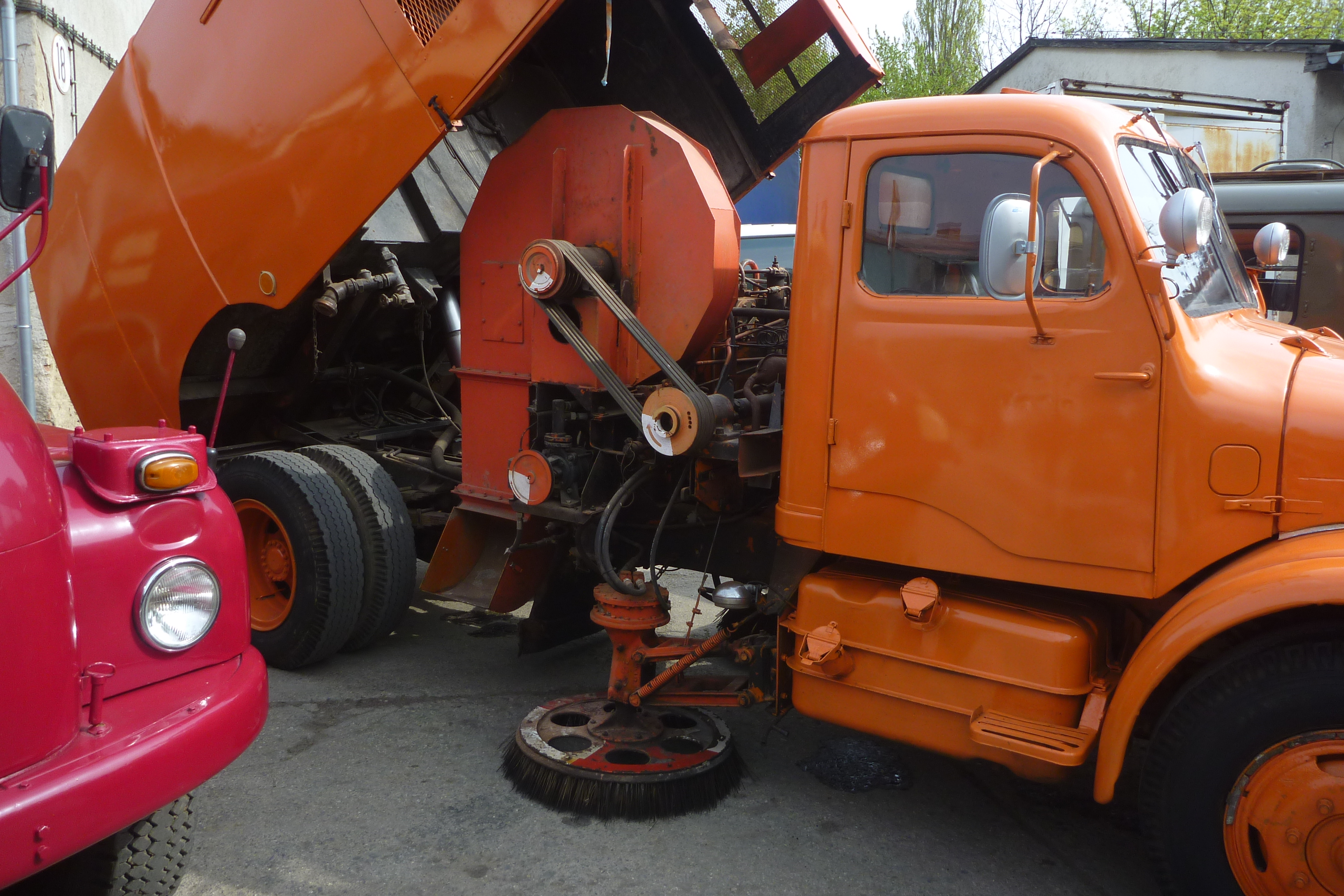 Praga S5T na DOD v depozitáři TMB v Řečkovicích